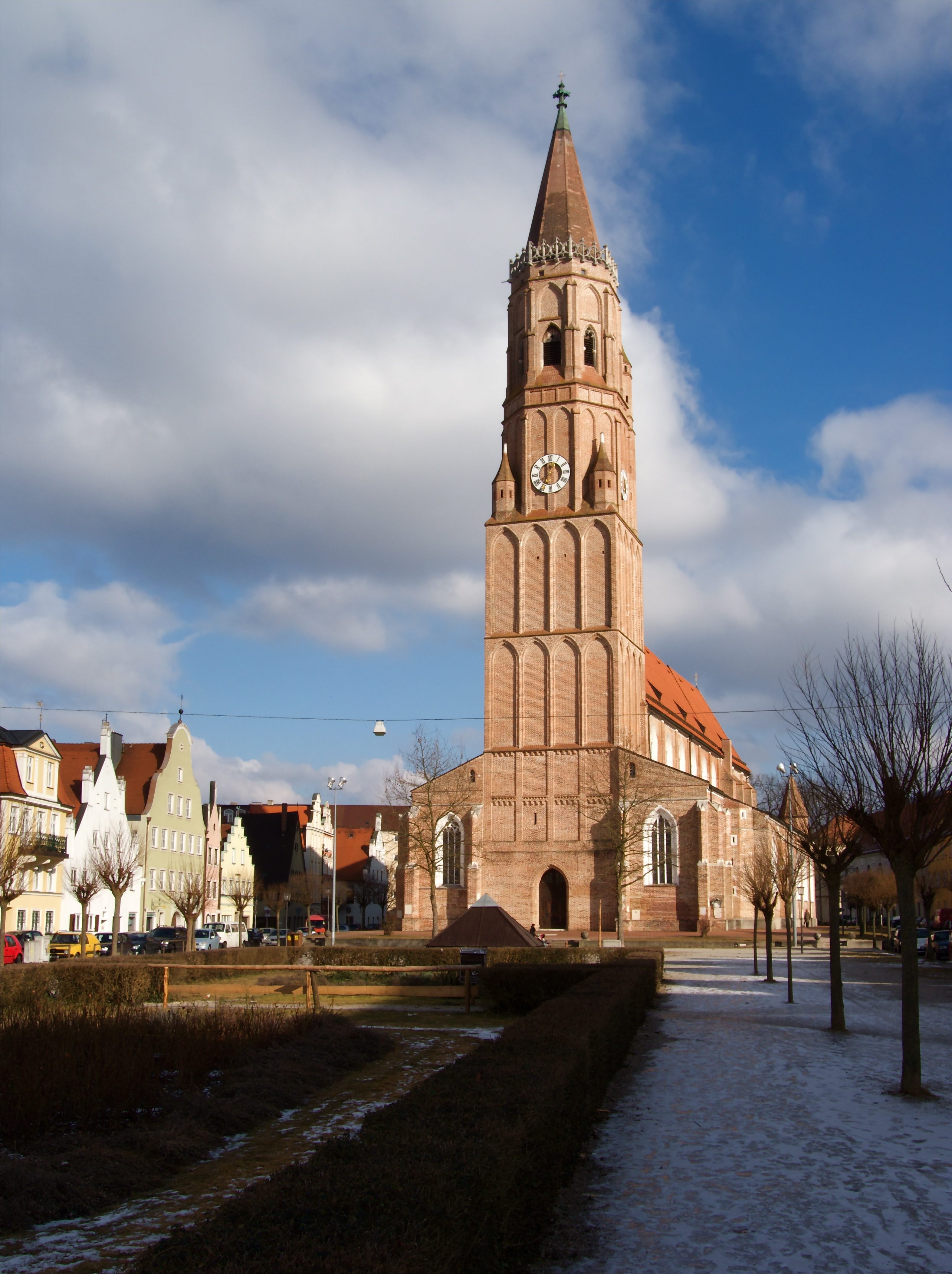 Kirche St. Jodok in Landshut.